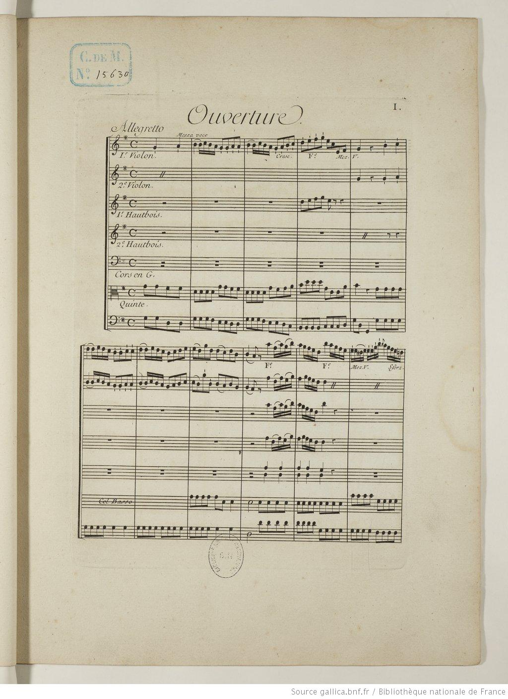 Ouverture dell'opera Dafni e Cloe (1779, Parigi) di Jean-Jacques Rousseau